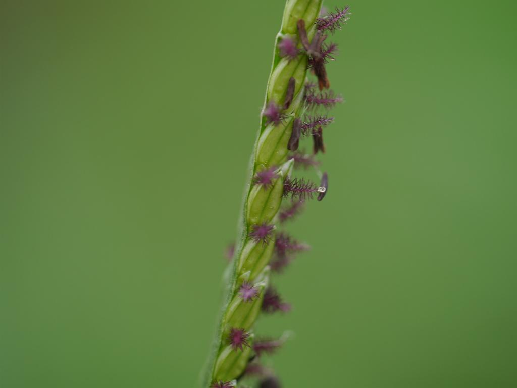 Paspalum distichum：キシュウスズメノヒエ 和歌山県田辺市2013年8月24日 本人撮影